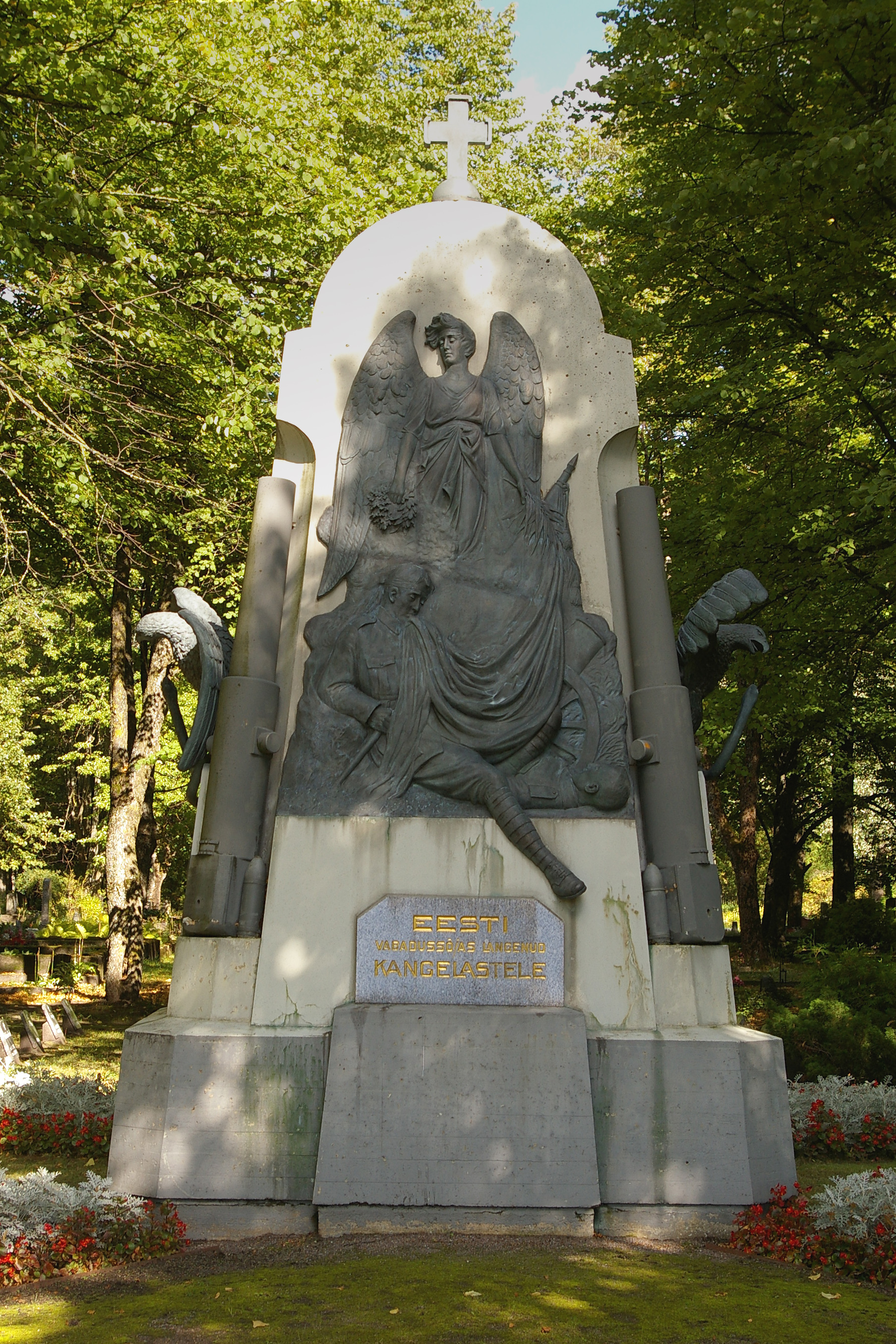 Vabadussõja mälestussammas asub Pärnu Alevi kalmistul. Autor: Amandus Adamson